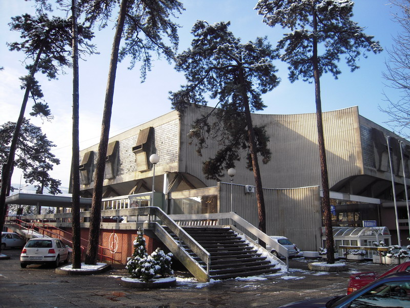 Спортска_дворана_Борик